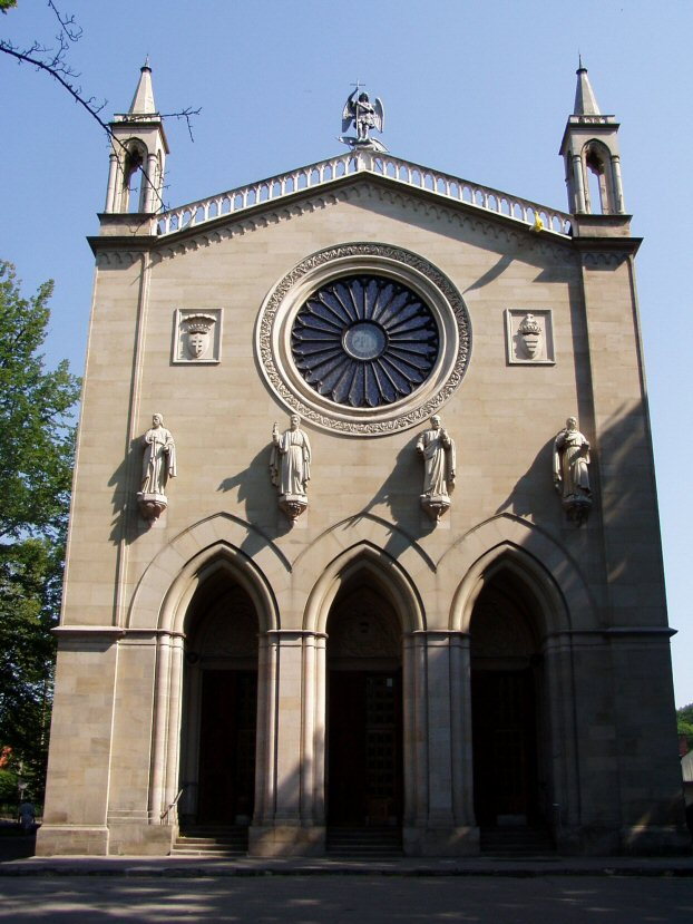 Kościół w Krzeszowicach. Autor W.Grabowski